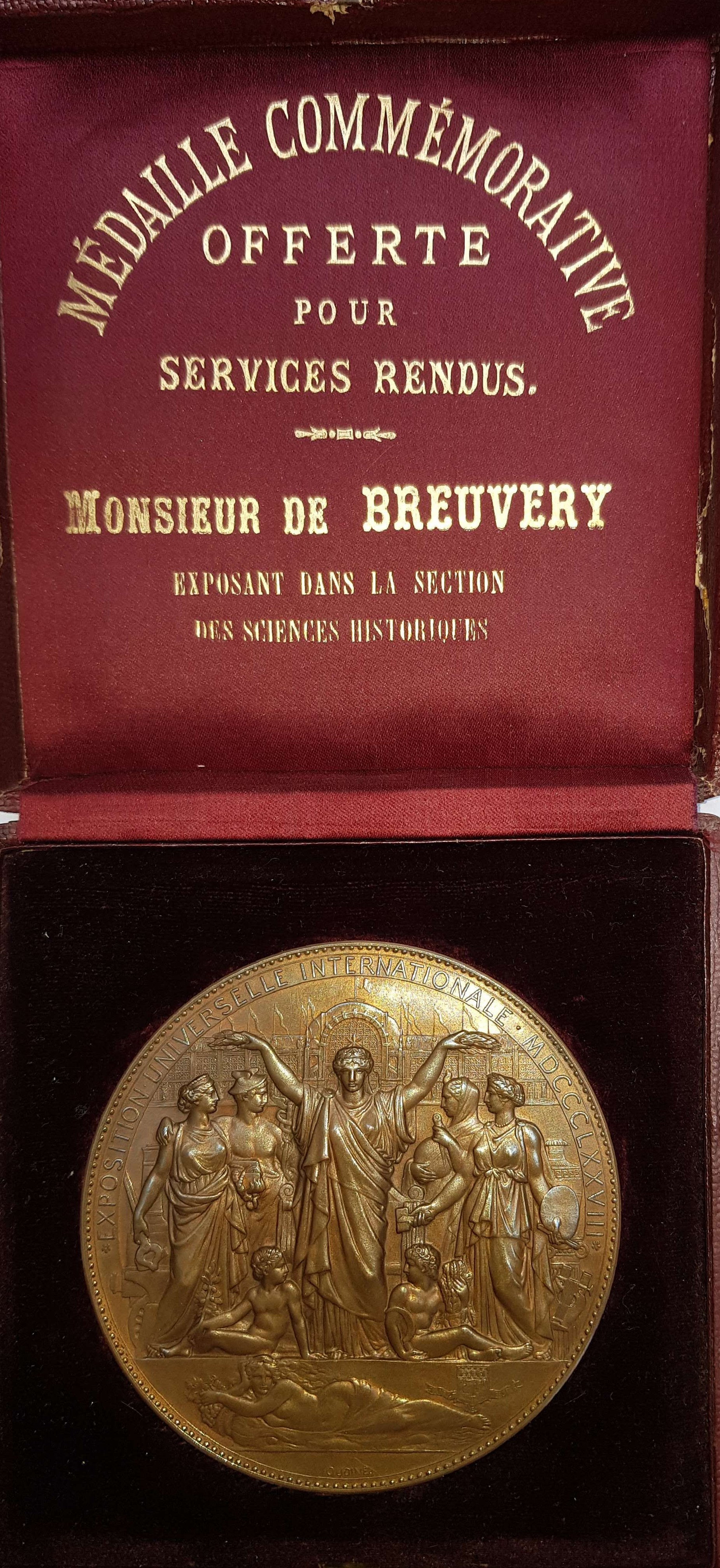 Médaille de l'exposition internationale